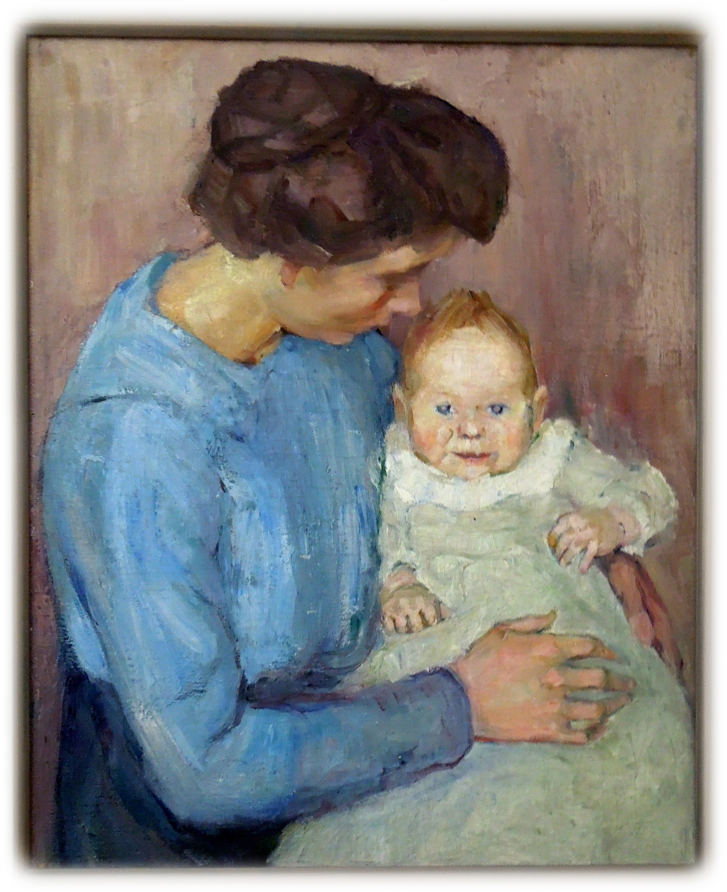 Eine Mutter mit Ihrem Kind stellt dieses Gemälde dar.